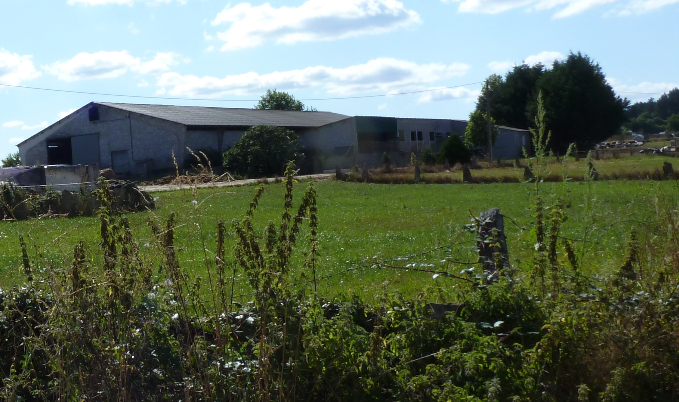 Lugar da Poza, parroquia da Cervela, concello do Incio, Lugo